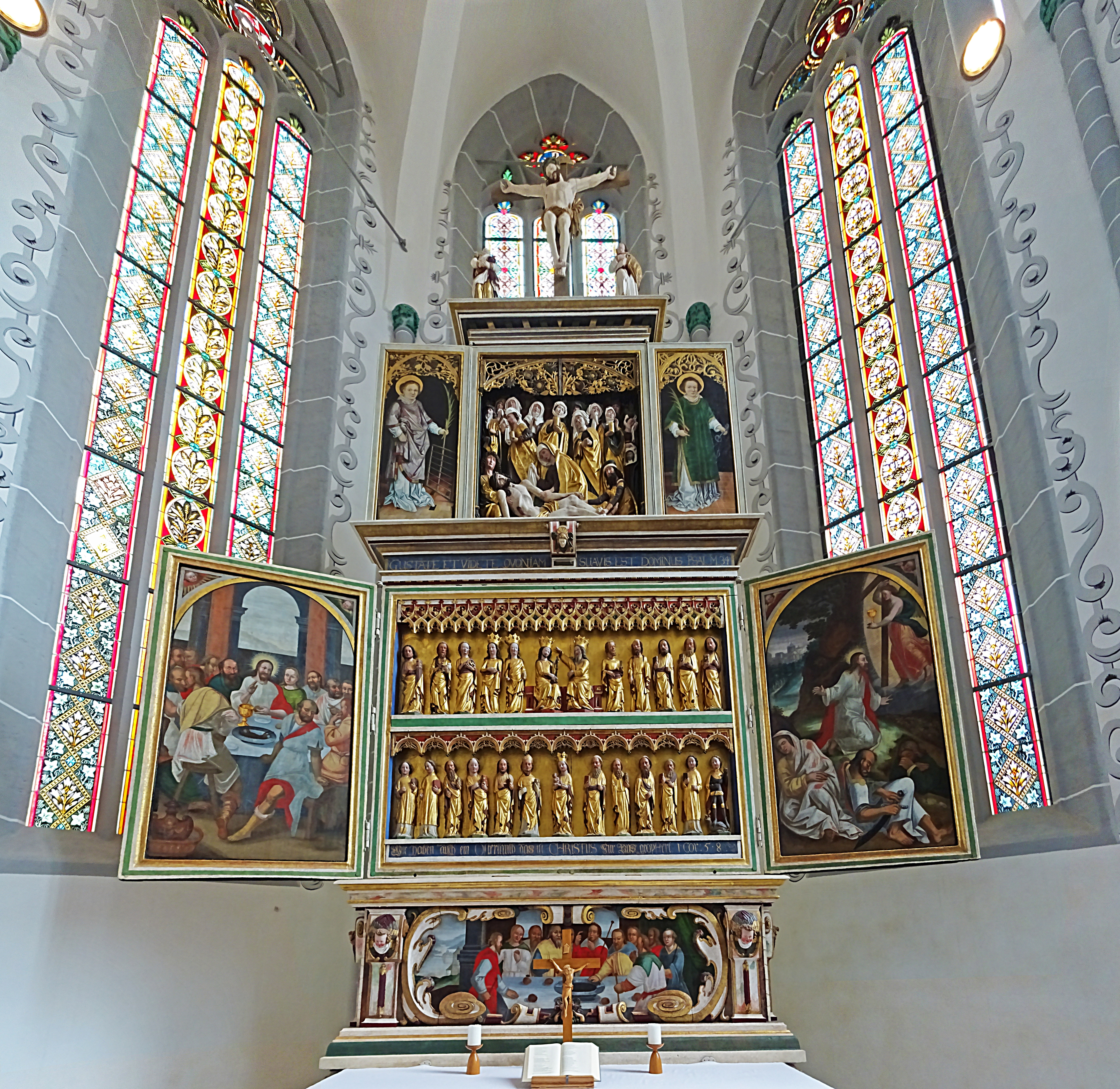 Chor mit Hochaltar in der Stadtkirche St. Peter und Paul (Weißensee)